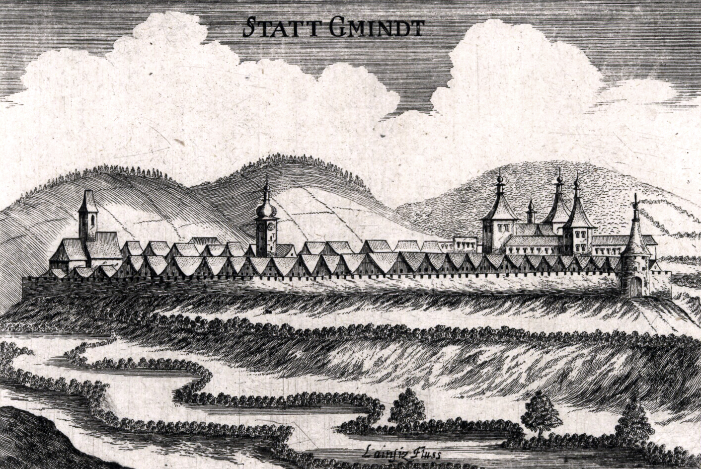 Kupferstich von G. M. Vischer der Stadt Gmünd aus dem Jahre 1672